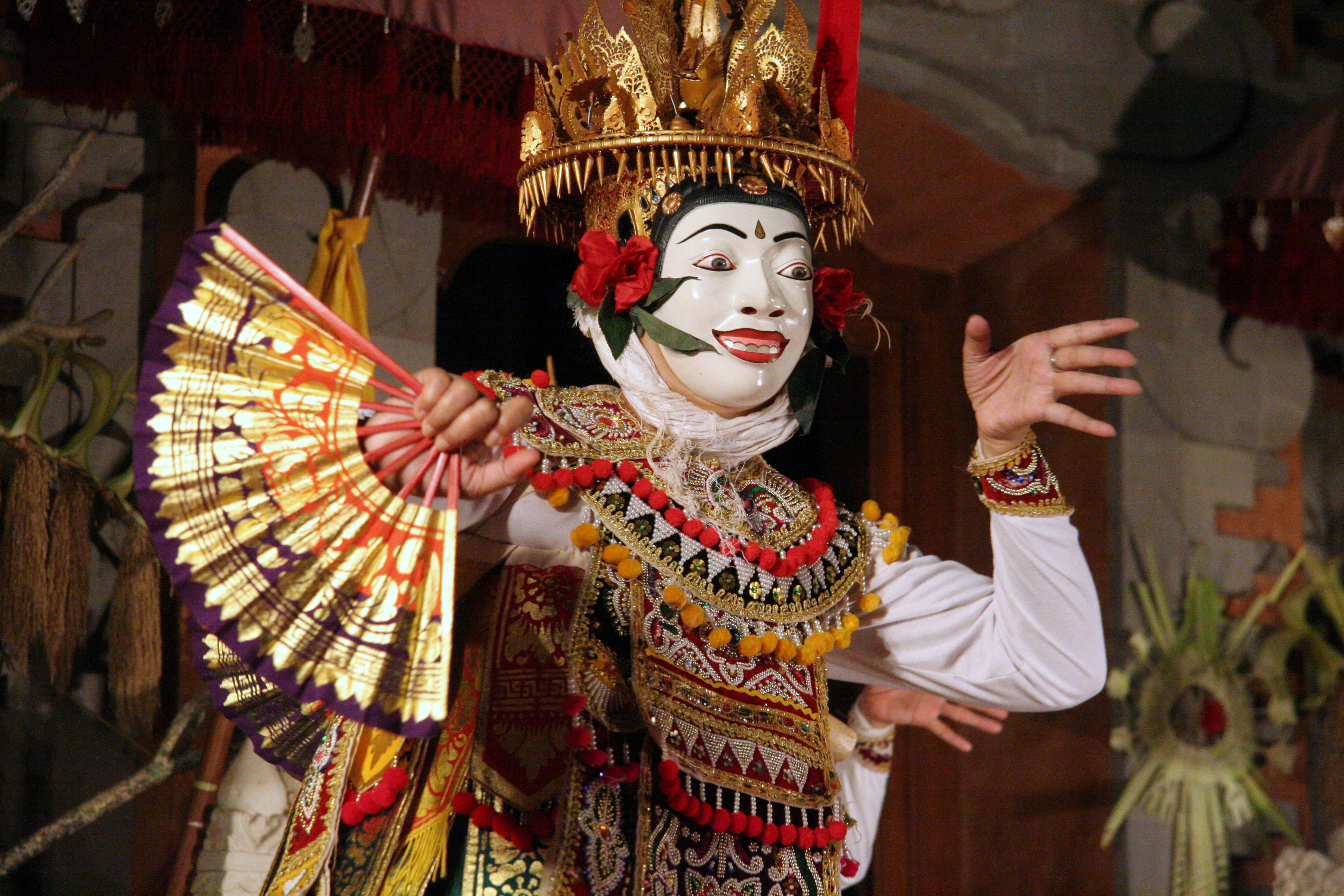 bali ubud danseur